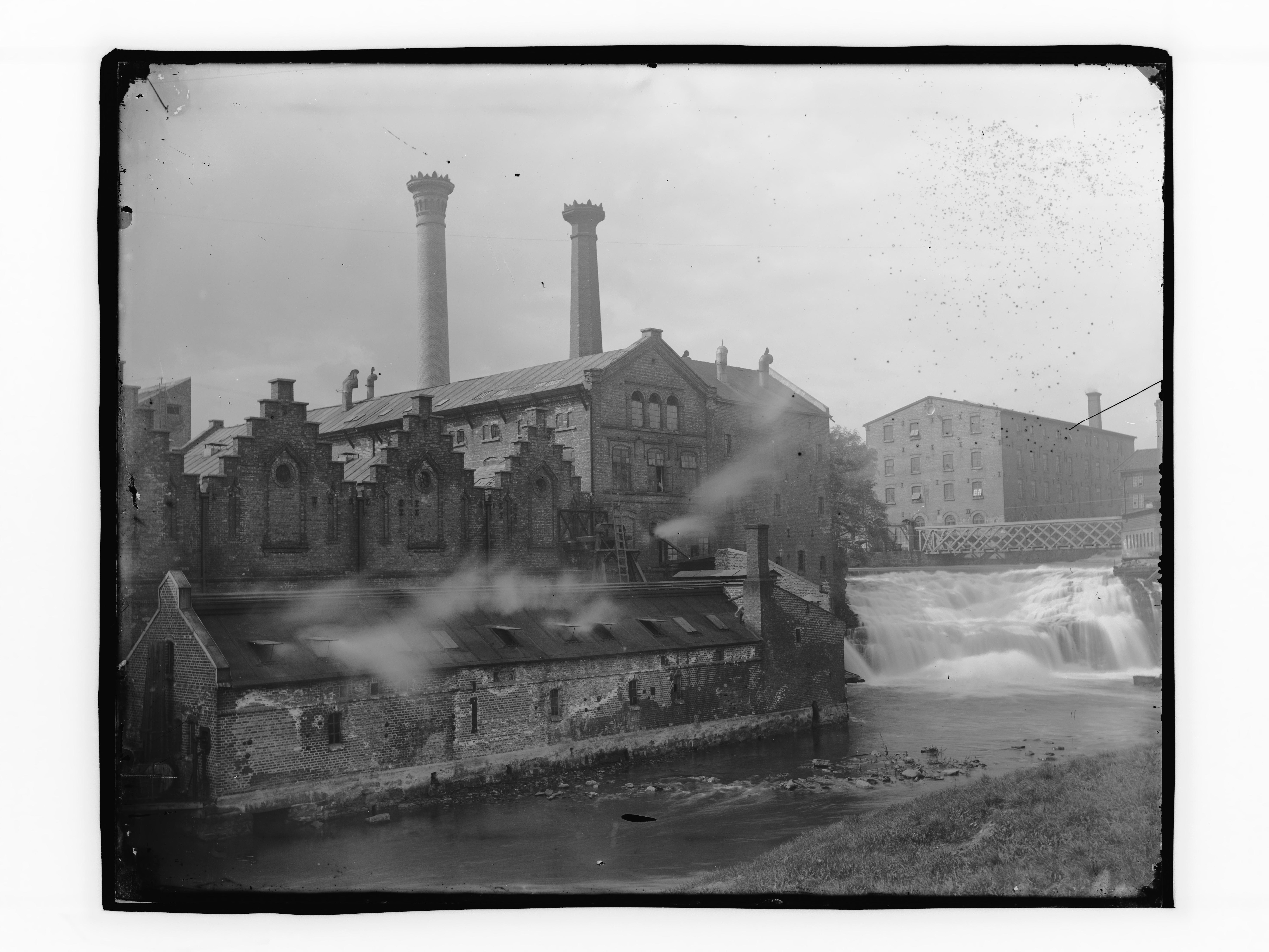 Påskrift konvolutt: B-1 Oslo. Akerselven. Hjula veveri. Sagveien. [Riksantikvaren] Sted: Akerselva Kommune: Oslo Fylke: Oslo Tagger: hovedstad by bebyggelse elv Hjula veveri